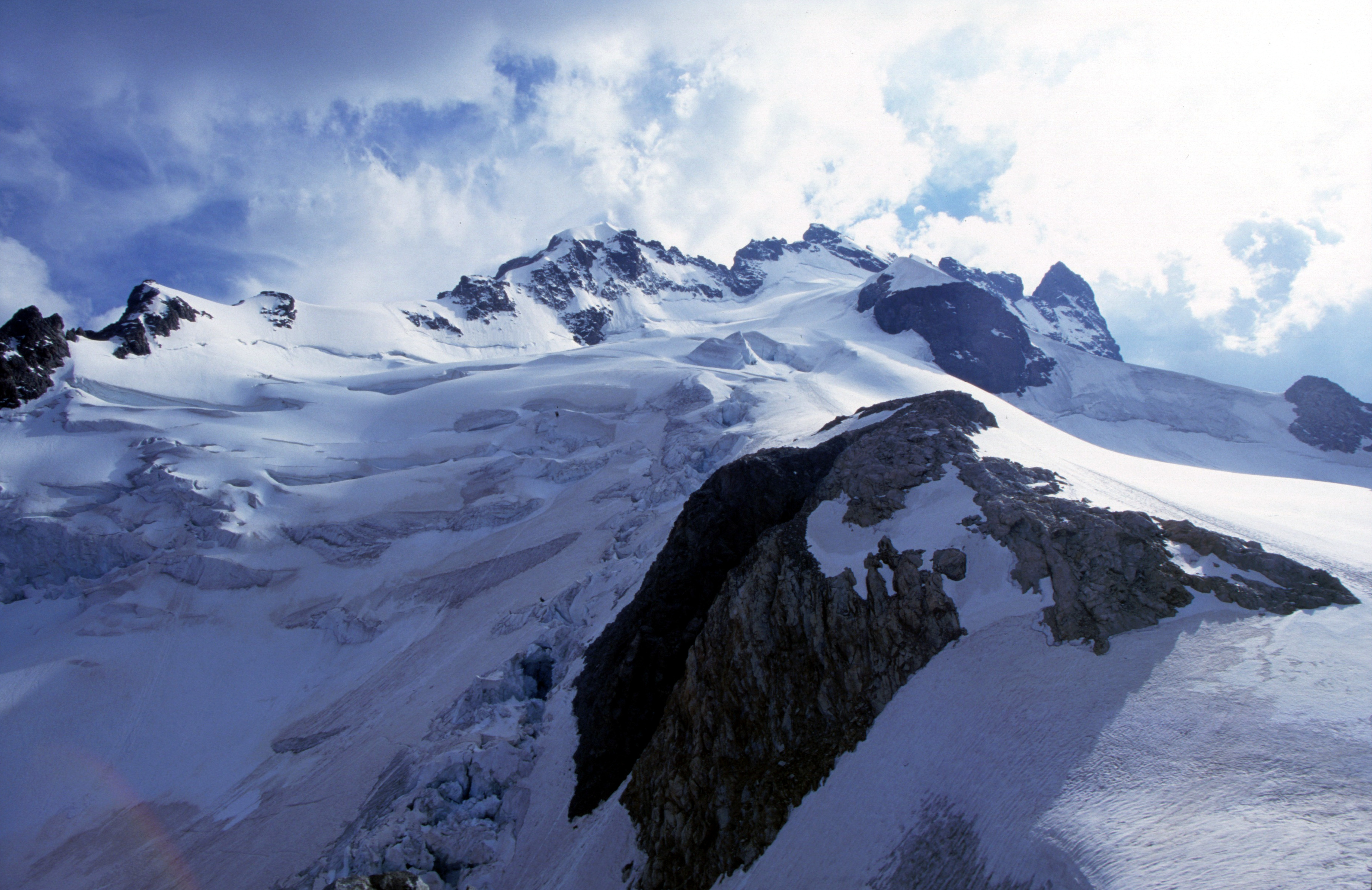 Vue de la Meije depuis le refuge de l'Aigle. Diapo scannée.